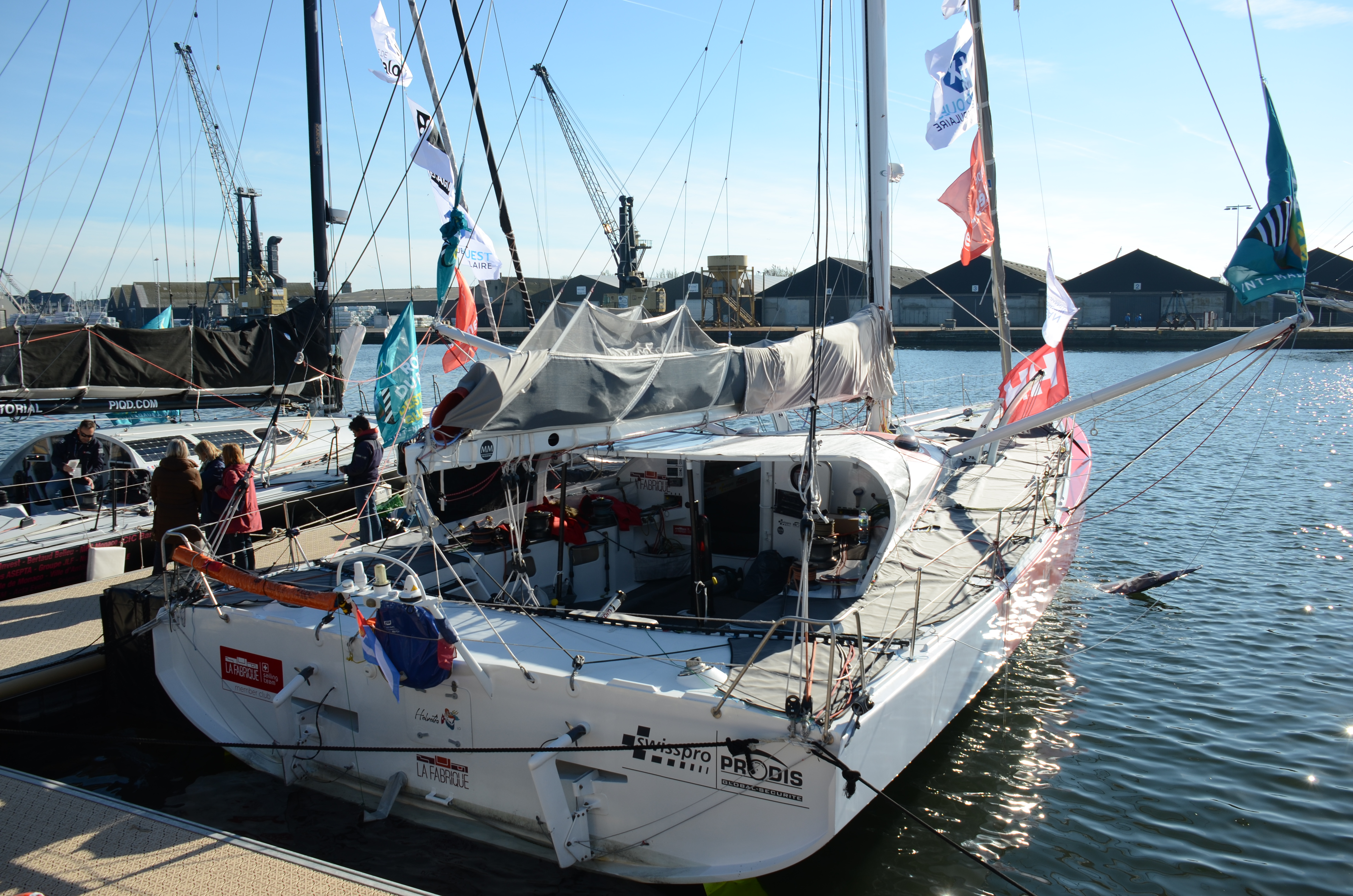 La Fabrique 2018 ex Brit Air,ex Macif